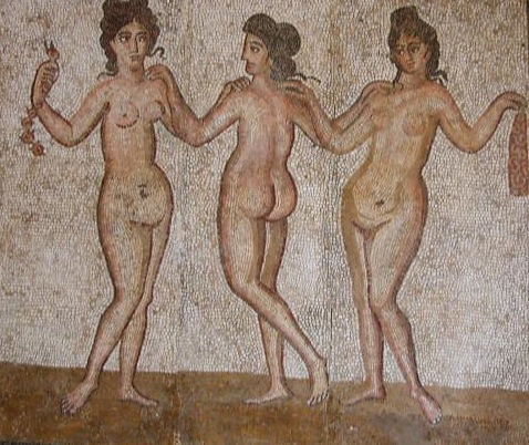 mosaïque, les baigneuses